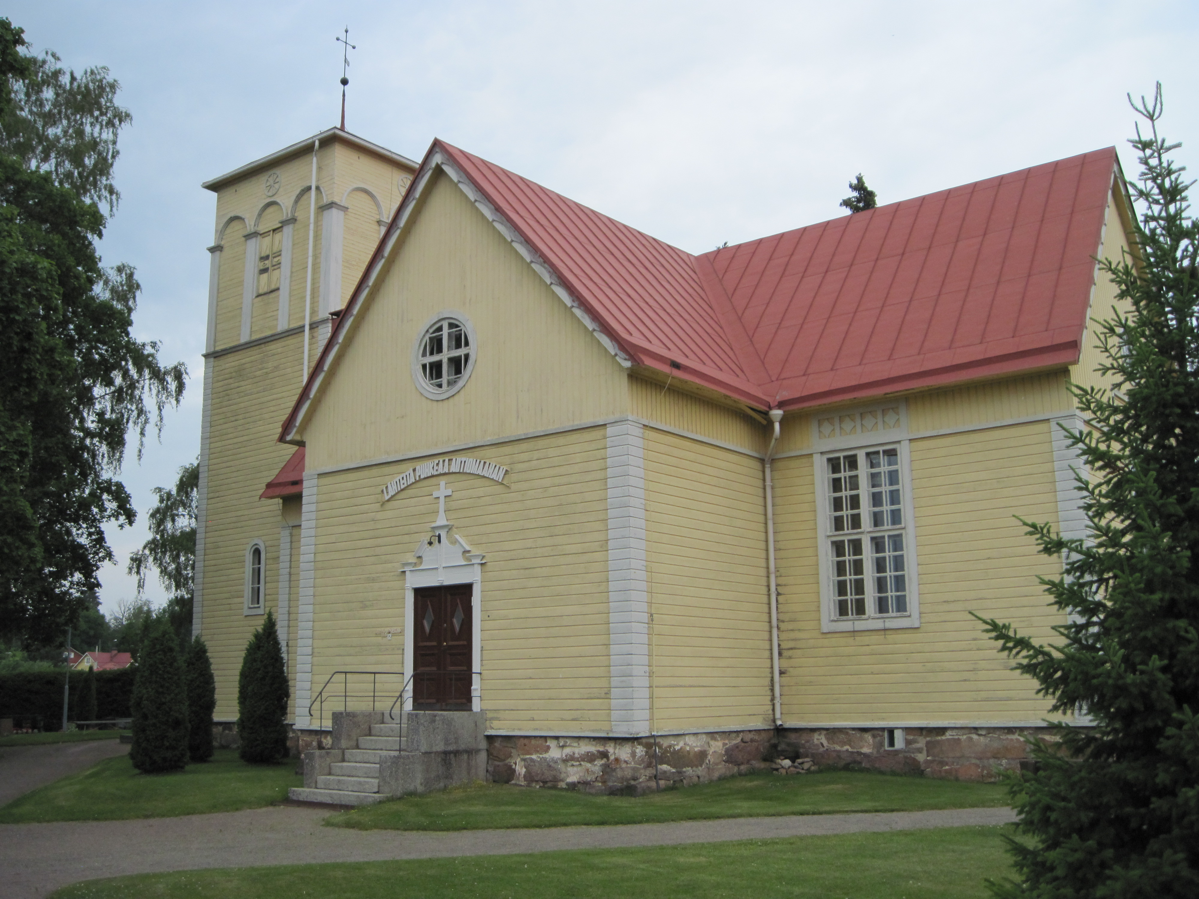 Hinnerjoen kirkko kesällä 2012